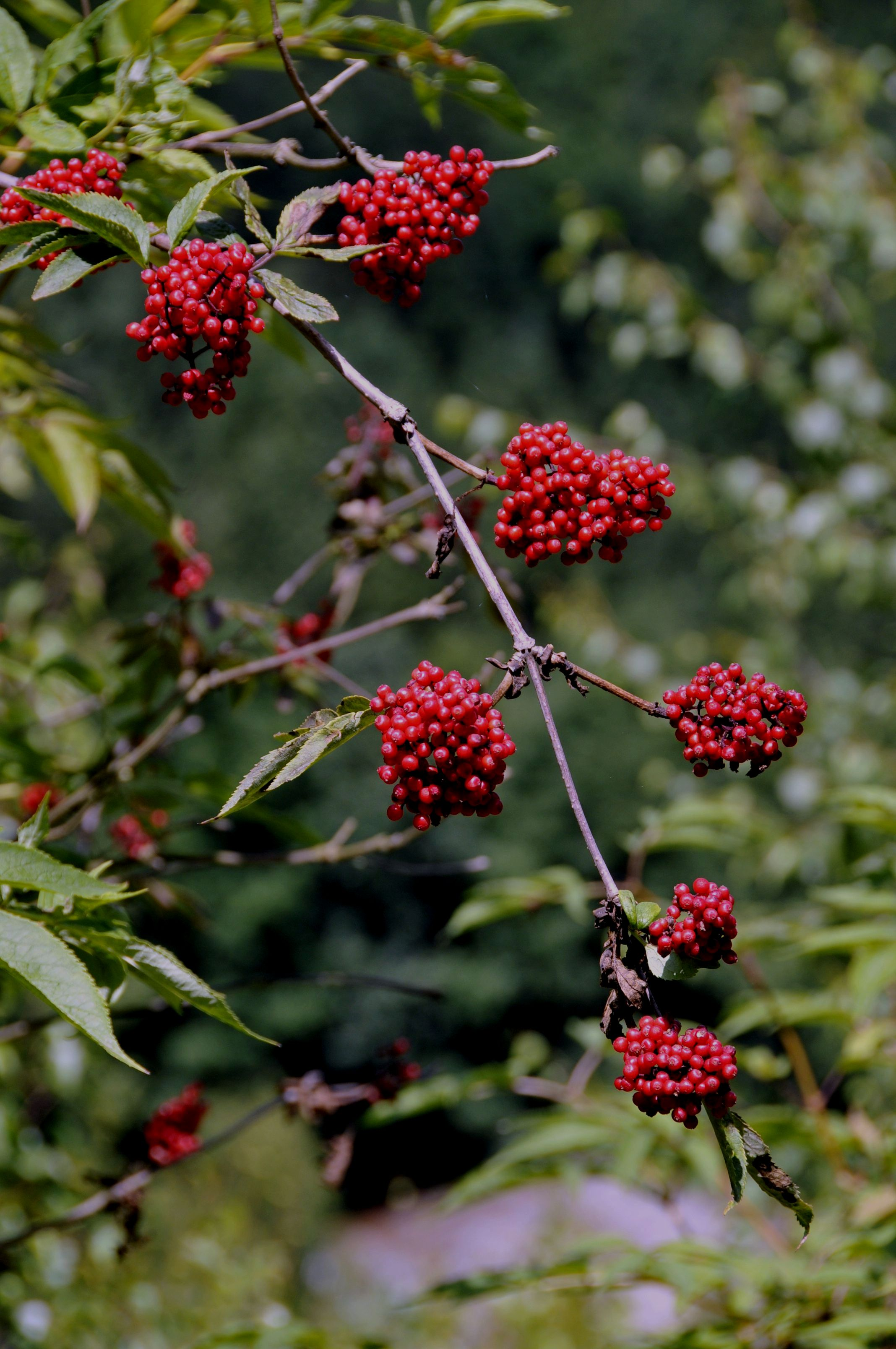 Roter Holunder